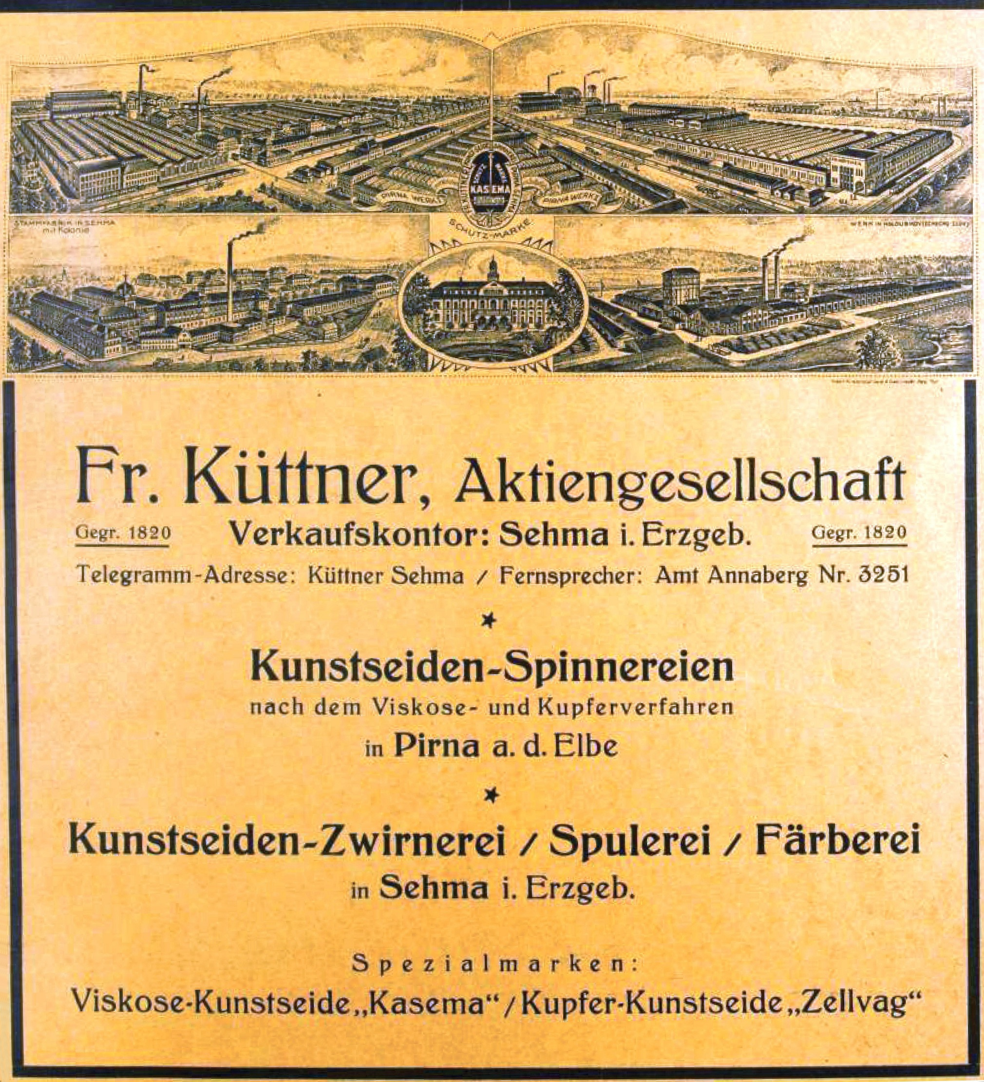 Werbeanzeige der Friedrich Richard Küttner AG Sehma im Adressbuch der Städte Annaberg, Buchholz und des Obererzgebirges von 1928